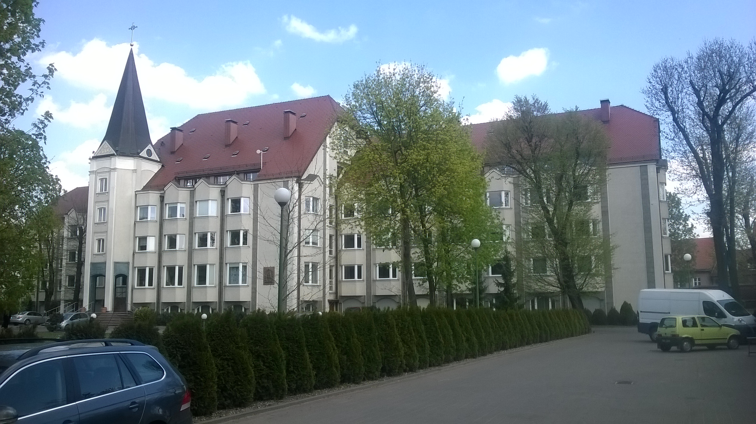 Nowy budynek Arcybiskupiego Seminarium Duchownego w Poznaniu.